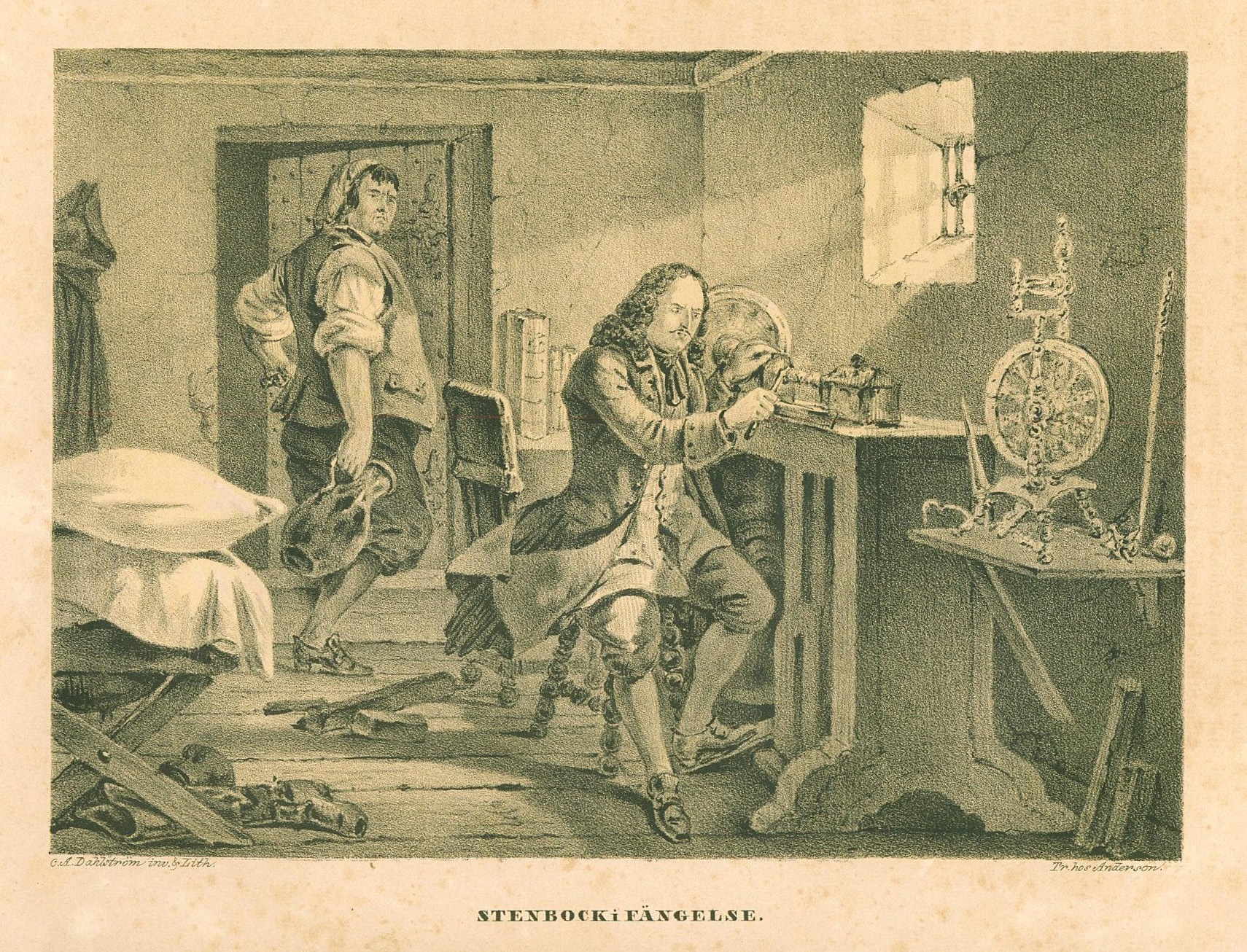 Stenbock i fängelse. Från "Teckningar ur Sveriges historia" av Carl Andreas Dahlström